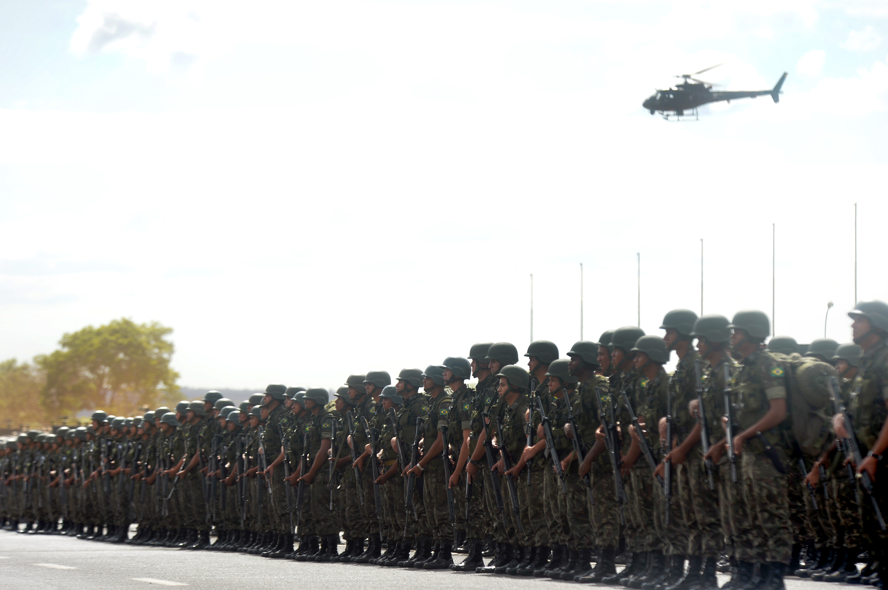 08/06/2014, Brasília - DF Fotos: Tereza Sobreira